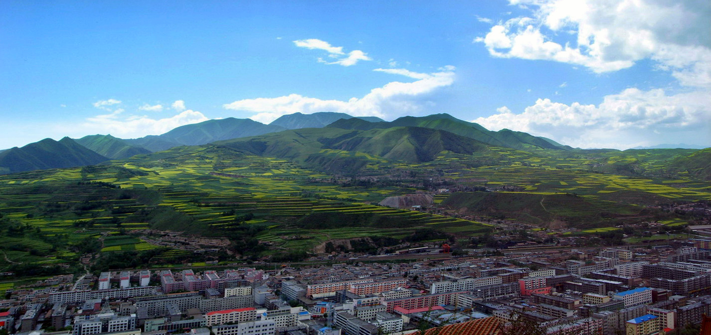 中文（中国大陆）: 中国，青海省西宁市，大通回族土族自治县。老爷山上俯瞰。